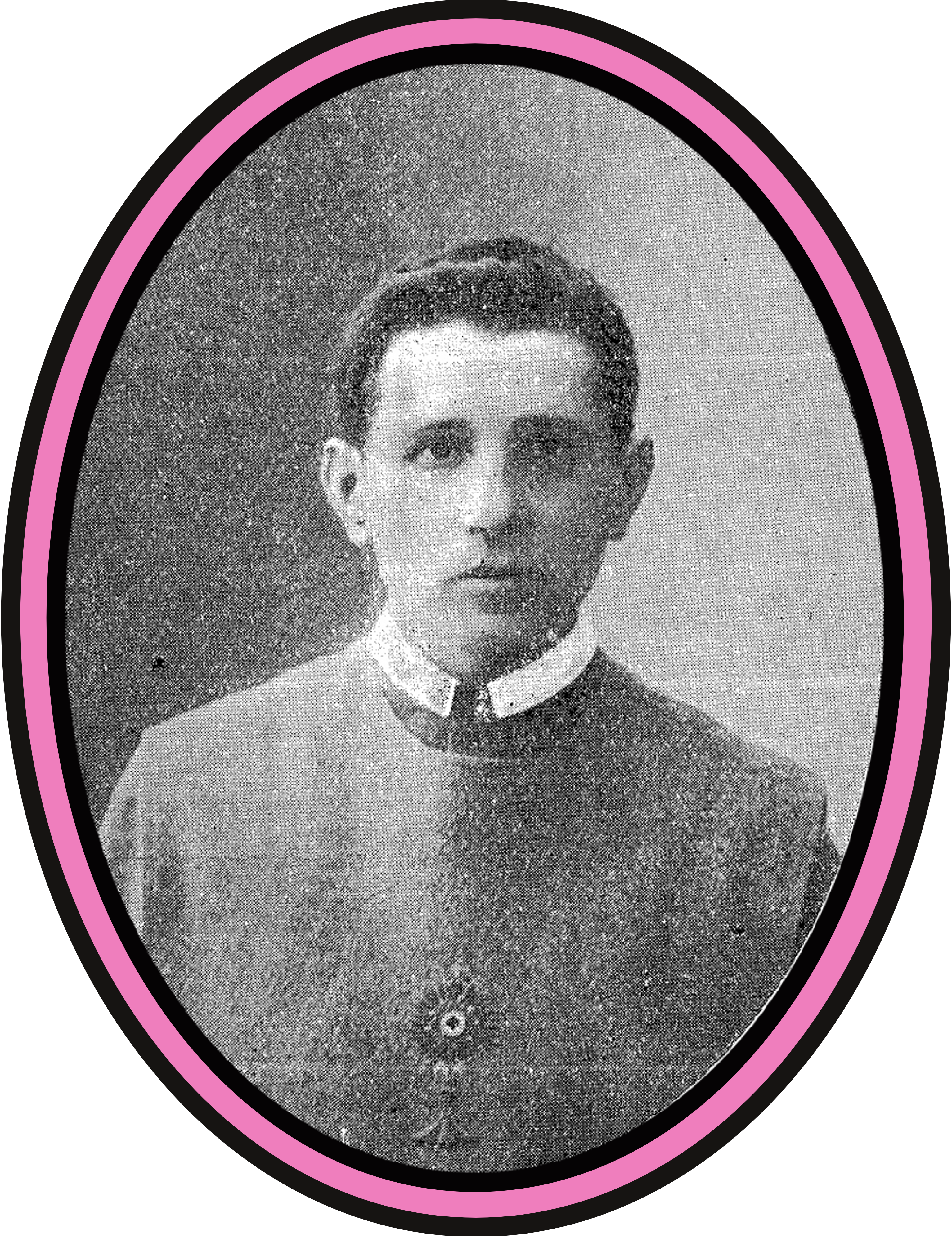 Biskup Stanisław Maria Tytus Siedlecki-duchowny Kościoła Katolickiego Mariawitów